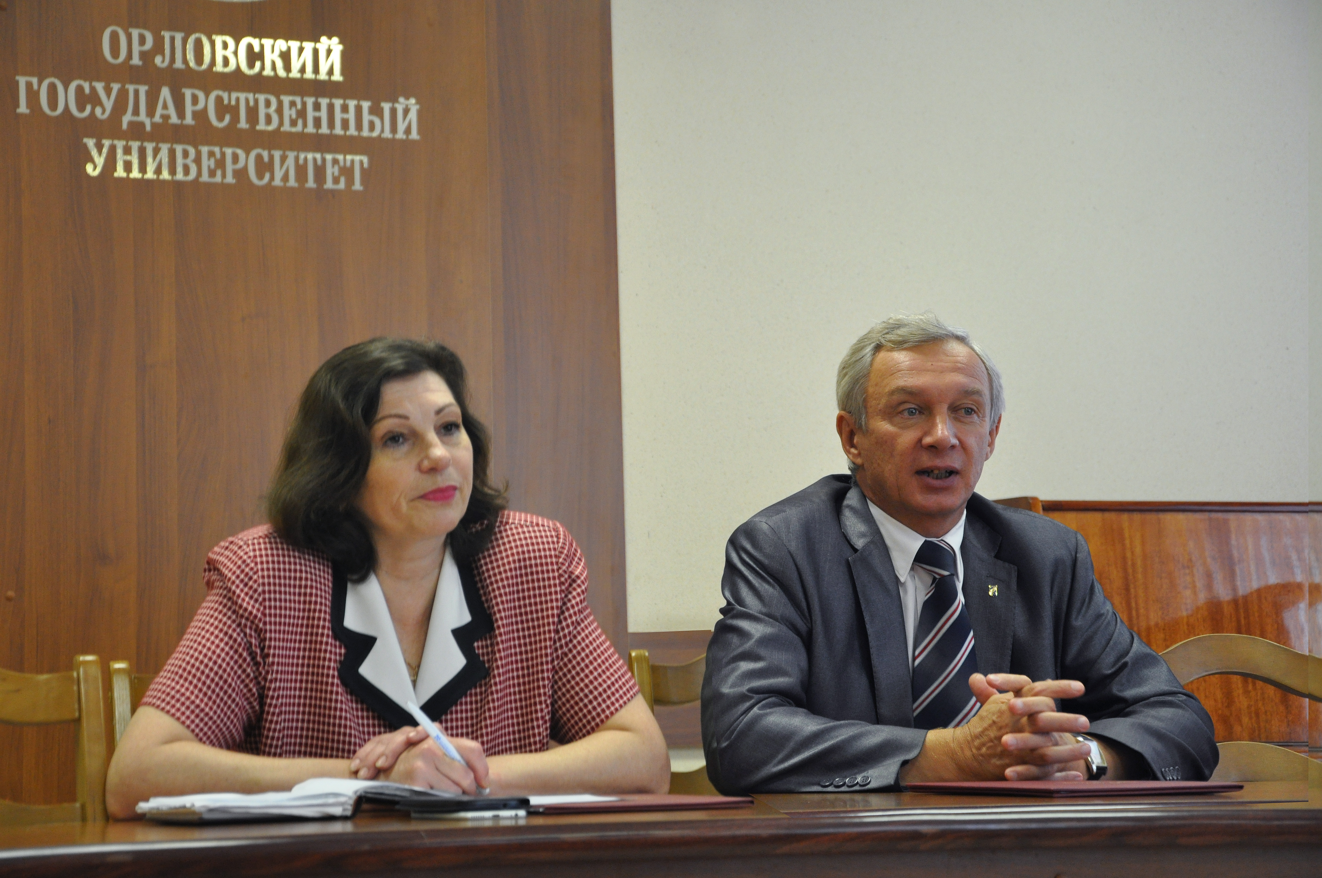 Пилипенко О.В на встрече с ректором Белорусского государственного университета Абламейко С. В.